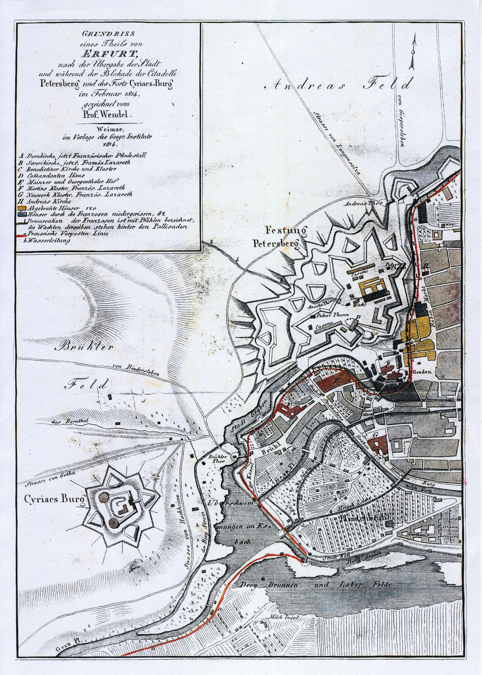 Grundriss der Zitadelle Petersberg in Erfurt während der Blockade von 1814